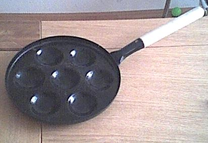 Zelfgemaakte foto van ons poffertjespannetje